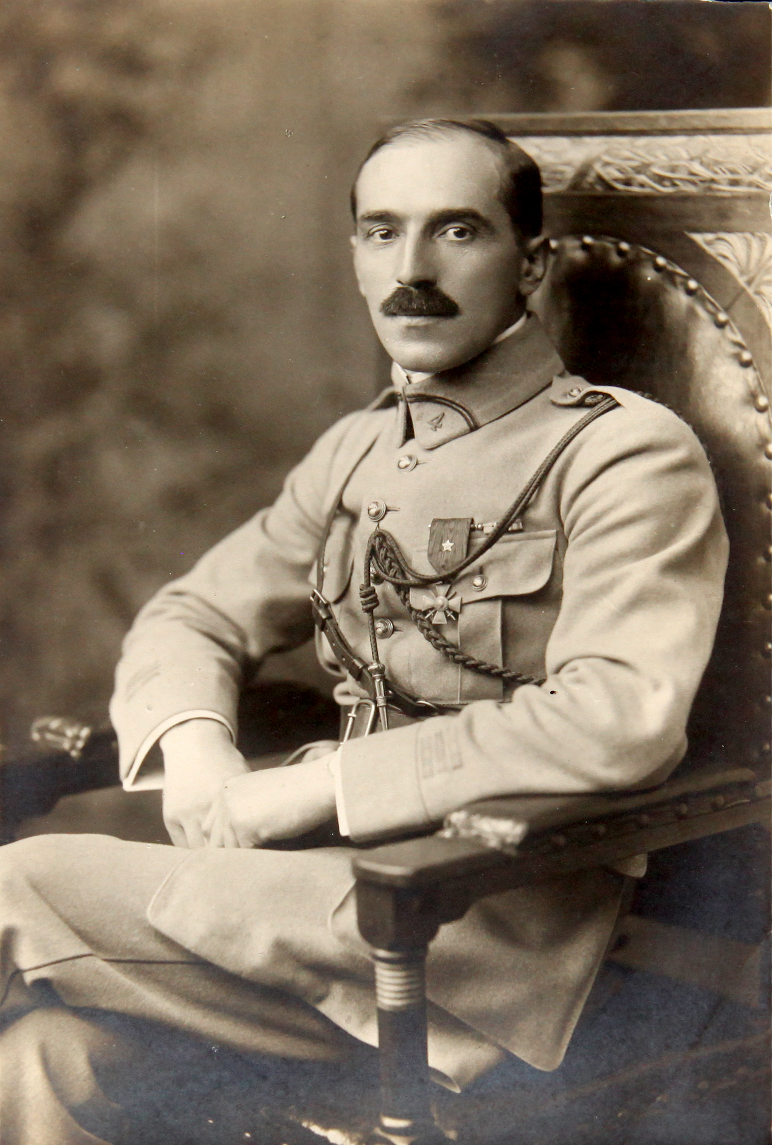 photographié à Ludwigshafen en Allemagne en juillet 1919